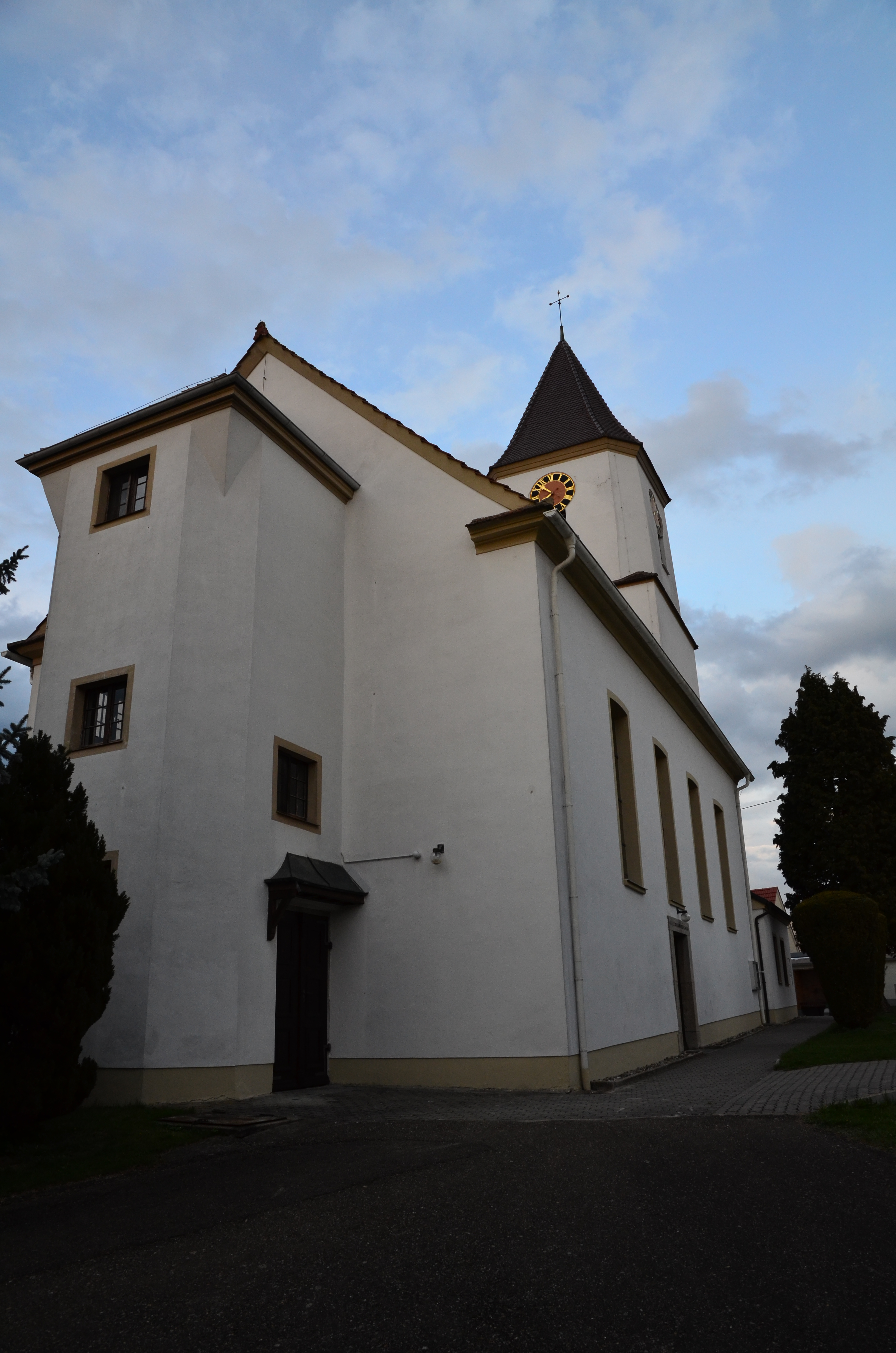 evang.-luth. Kirche St. Maria in Ostheim evang.-luth. Kirche St. Lorenz in Schaffhausen